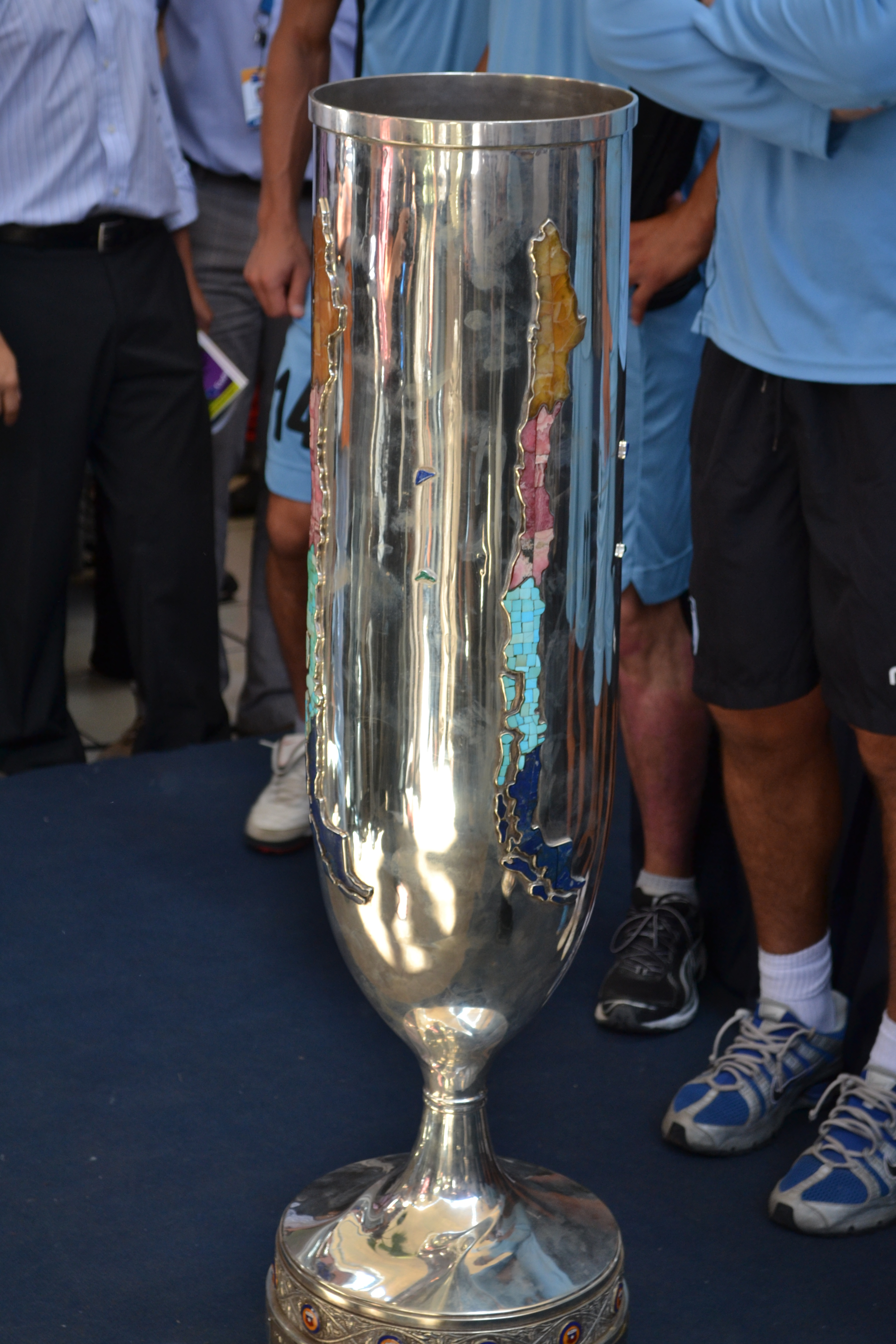 Copa Chile obtenida por Deportes Iquique en 2010